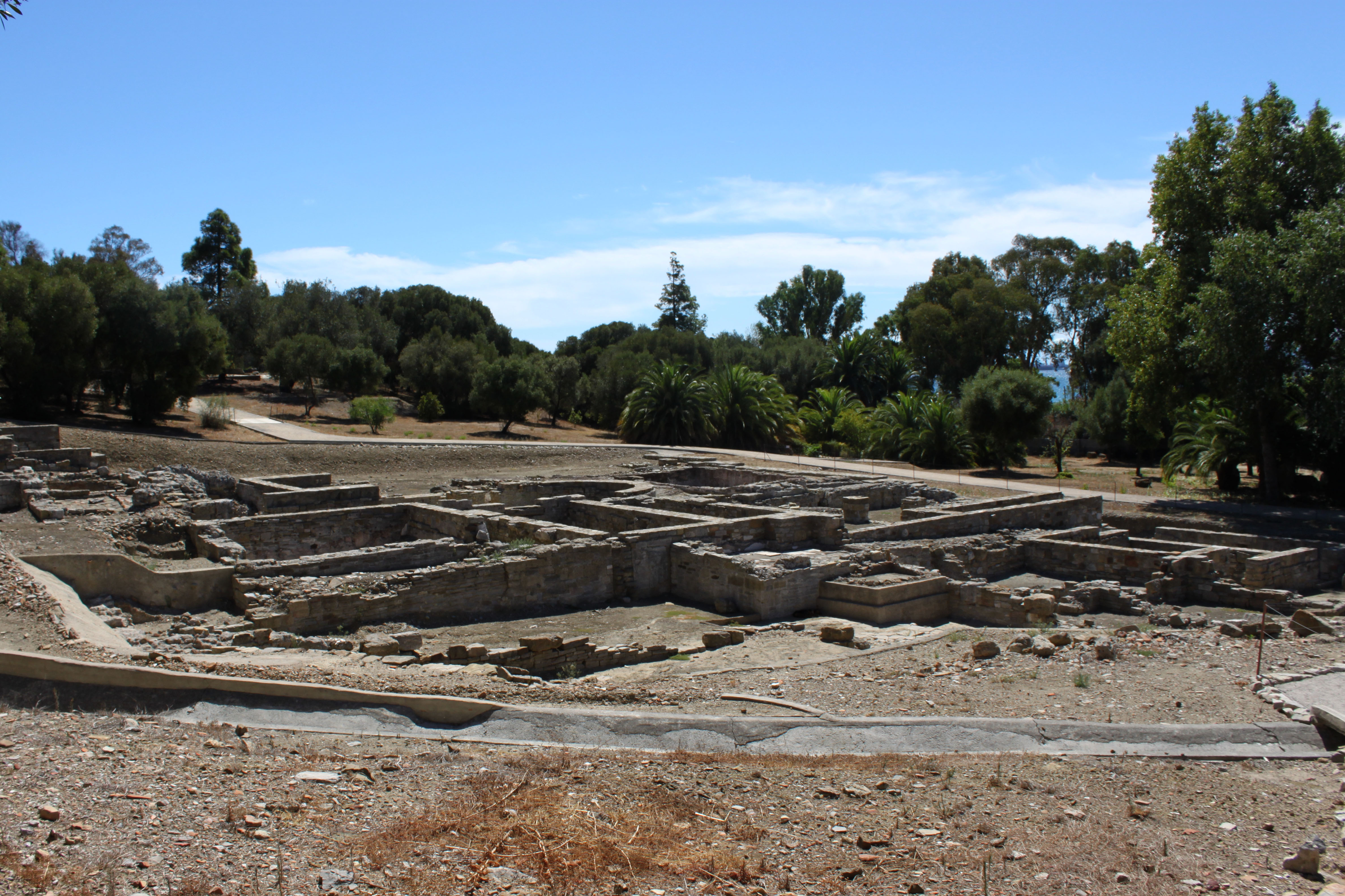 Estructuras visibles de las Termas del yacimiento romano de Carteia. San Roque, Andalucía, España.